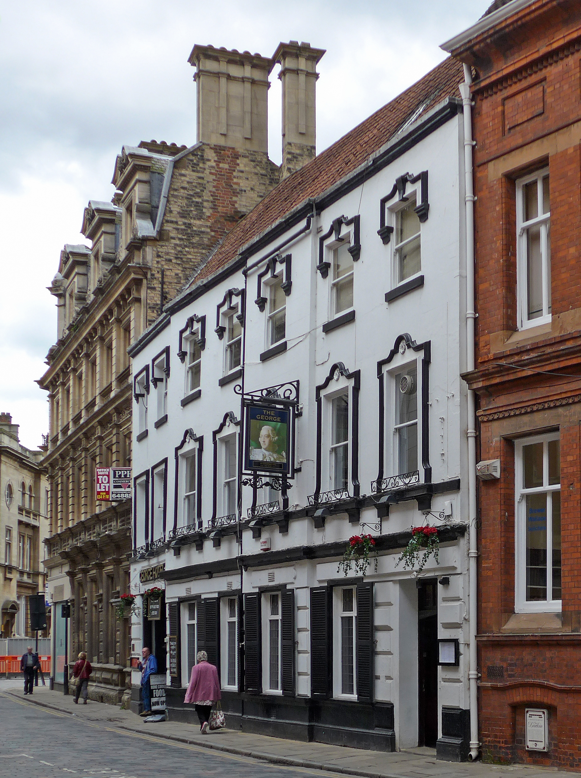 Best street name ever